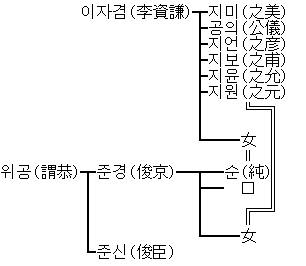 척준경(拓俊京)의 가계